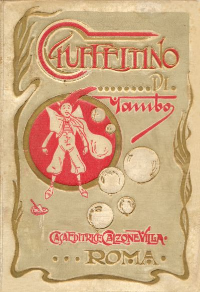 Copertina del romanzo per ragazzi Ciuffettino scritto e illustrato da Yambo.